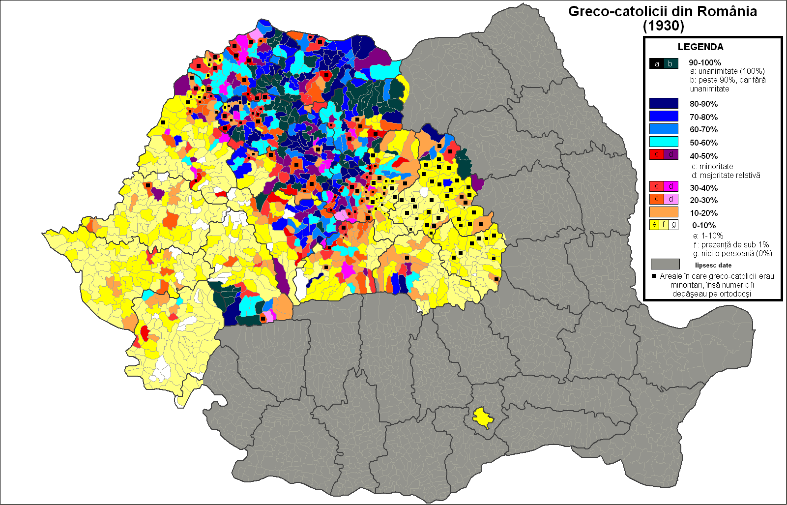 Distibuţia greco-catolicilor în România conform recensământului din 1930. Harta reprezintă frontierele actuale, precum şi limitele administrative actuale: judeţe, comune, oraşe. Nu sunt reprezentaţi în hartă greco-catolicii din Bucovina care în unele localităţi alcătuiau o majoritate sau o minoritate semnificativă. Greco-catolicii bucovineni erau de regulă imigranţi români din Transilvania şi Maramureş, precum şi imigranţi huţuli şi ruteni din Galiţia.